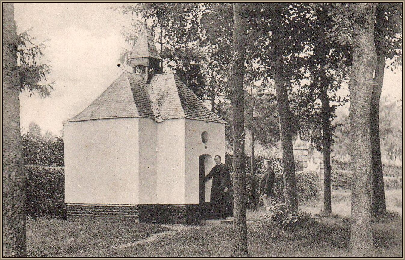 Onze-Lieve-Vrouw-van-Smartenkapel in 1895, Afferden, Nederland